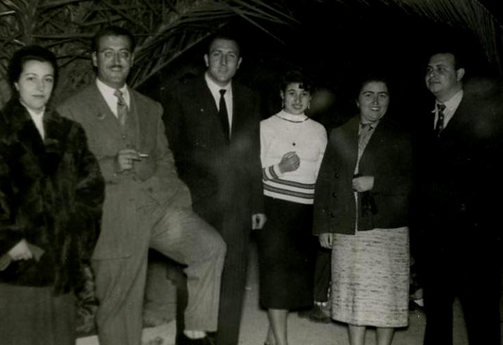 Francisco Ramírez Suárez (Ezra Roit Schwart) y familia en Veracruz, México, luego del exilio en 1939.